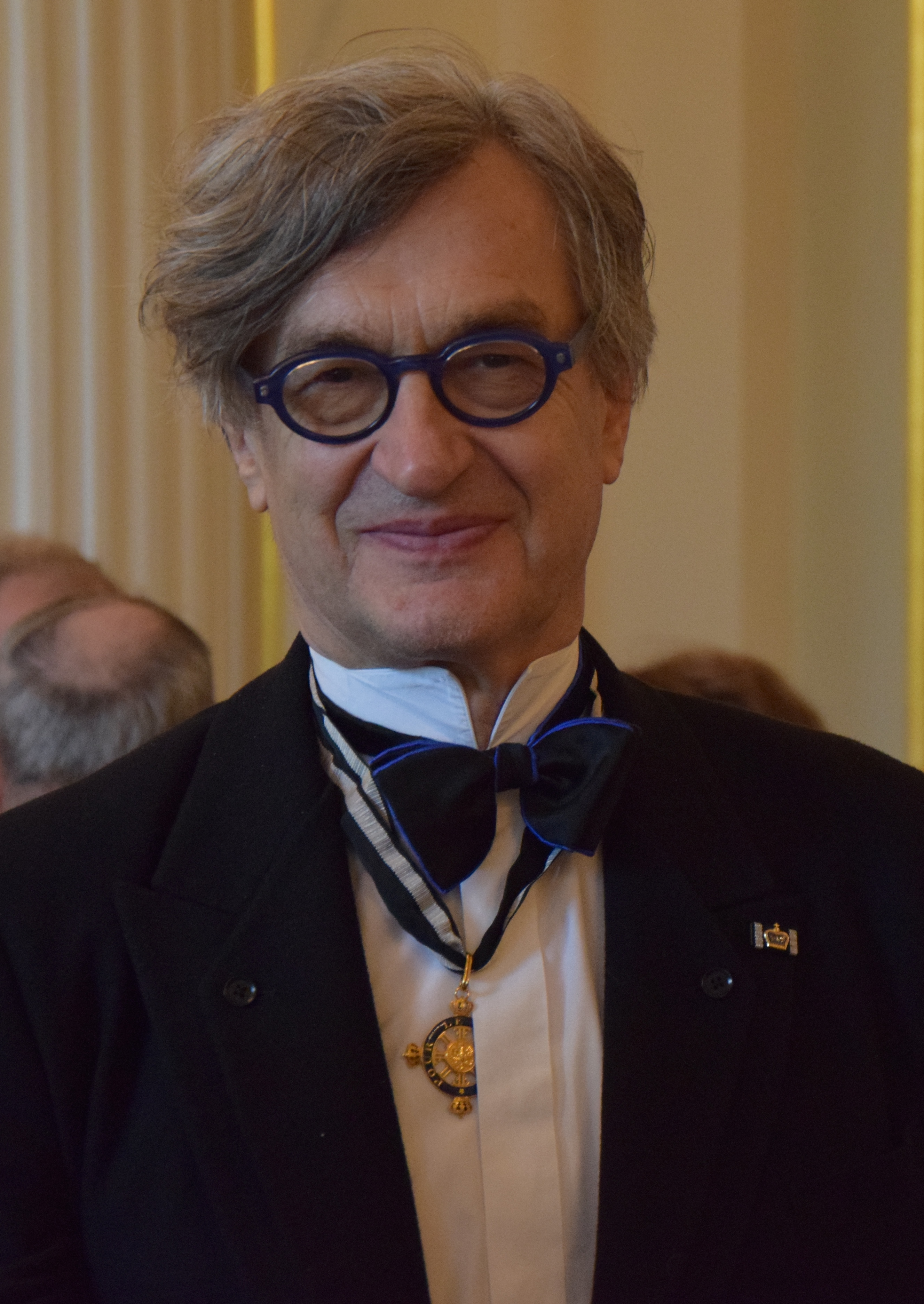 Öffentliche Sitzung der Mitglieder des Ordens Pour le mérite für Wissenschaften und Künste 2014 im Konzerthaus am Gendarmenmarkt in Berlin